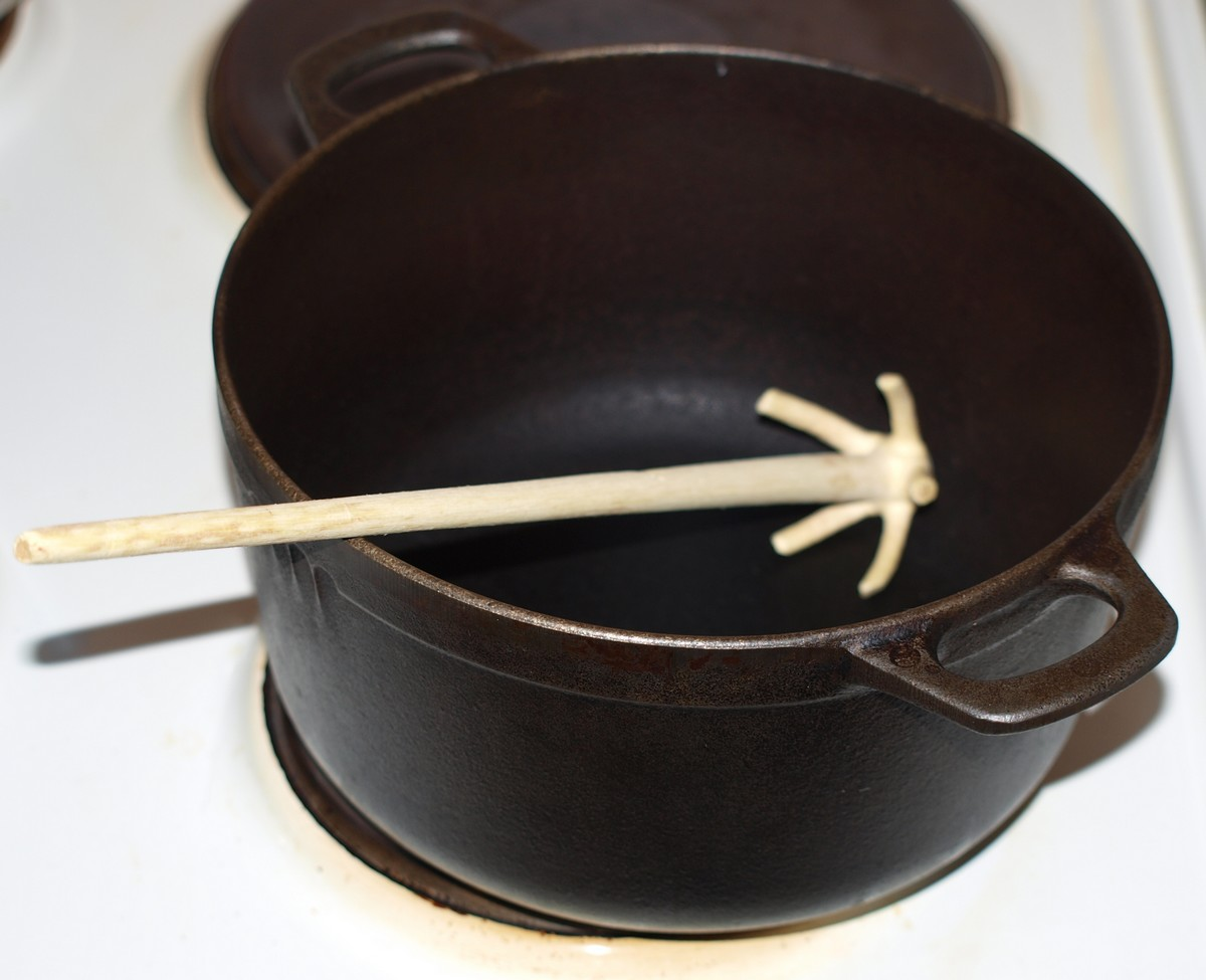 laga av furutopp